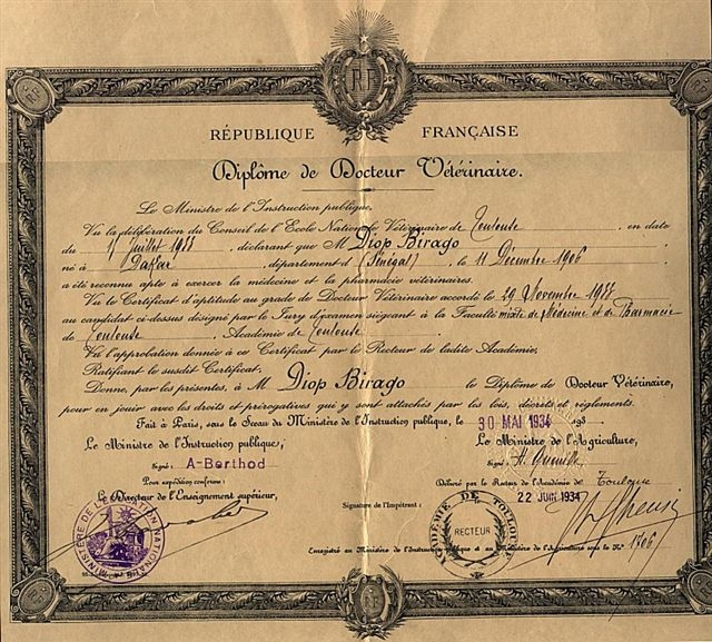 Diplôme de docteur vétérinaire de Birago Diop, ancien élève de l'École vétérinaire de Toulouse.